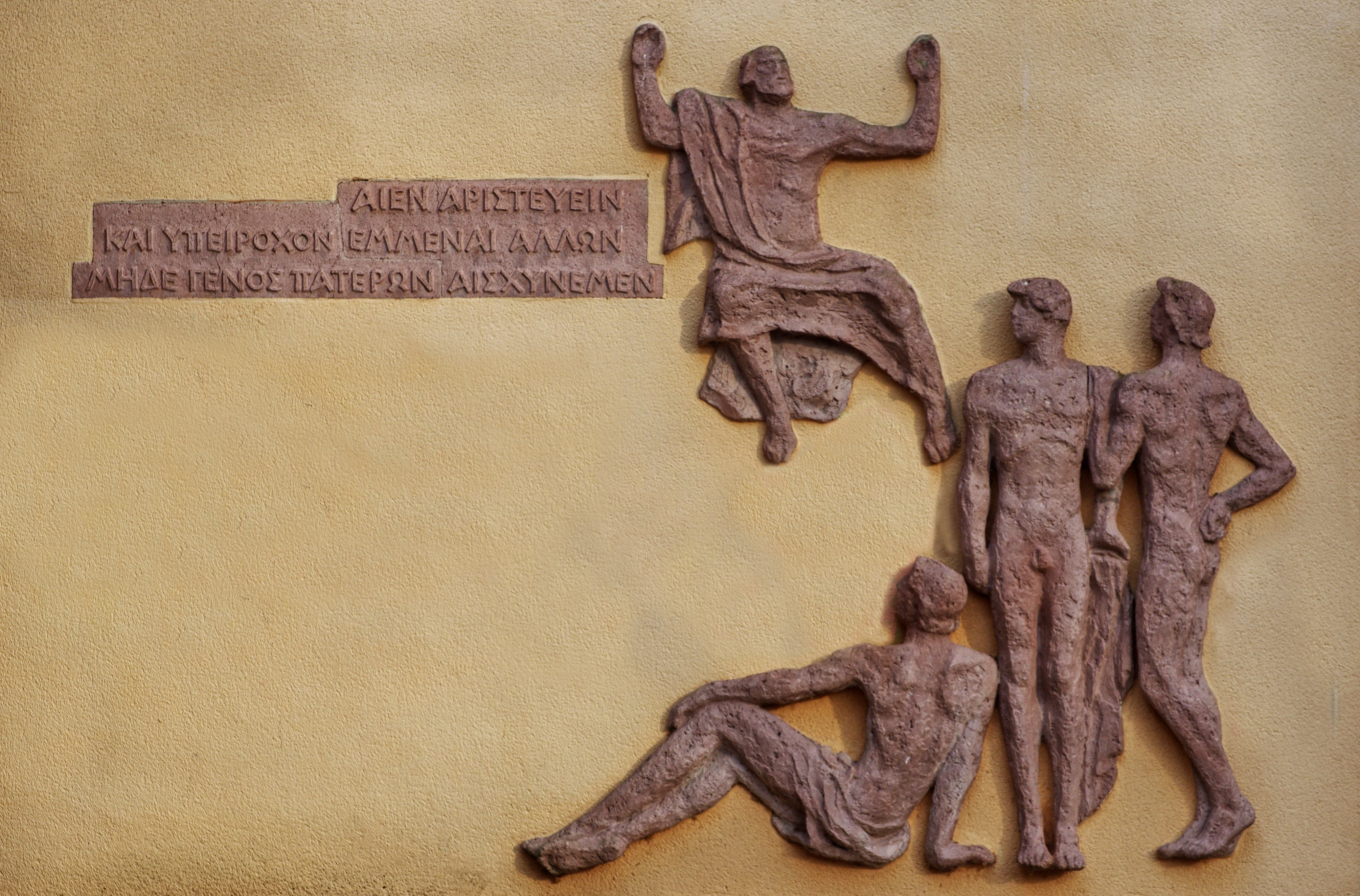 Homer Relief mit griechíscher Schrift am Berthold-Gymnasium Freiburg in Freiburg.Tekst: ΑΙΕΝ ΑΡΙΣΤΕΥΕΙΝ ΚΑΙ ΥΠΕΙΡΟΧΟΝ ΕΜΜΕΝΑΙ ΑΛΛΩΝ, ΜΗΔΕ ΓΕΝΟΣ ΠΑΤΕΡΩΝ ΑΙΣΧΥΝΕΜΕΝ"Aien aristeuein kai hypeirochon emmenai allon mede genos pateron aischynemendeutsch: "Immer der Beste sein und den anderen überlegen, aber dem Geschlecht der Väter keine Schande bereiten"